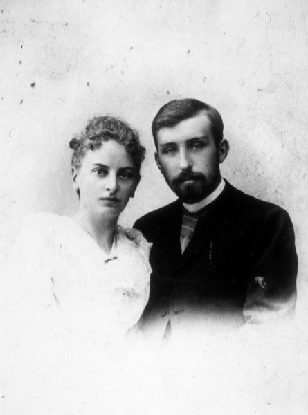 Инесса Арманд с мужем Александром в 1895 году